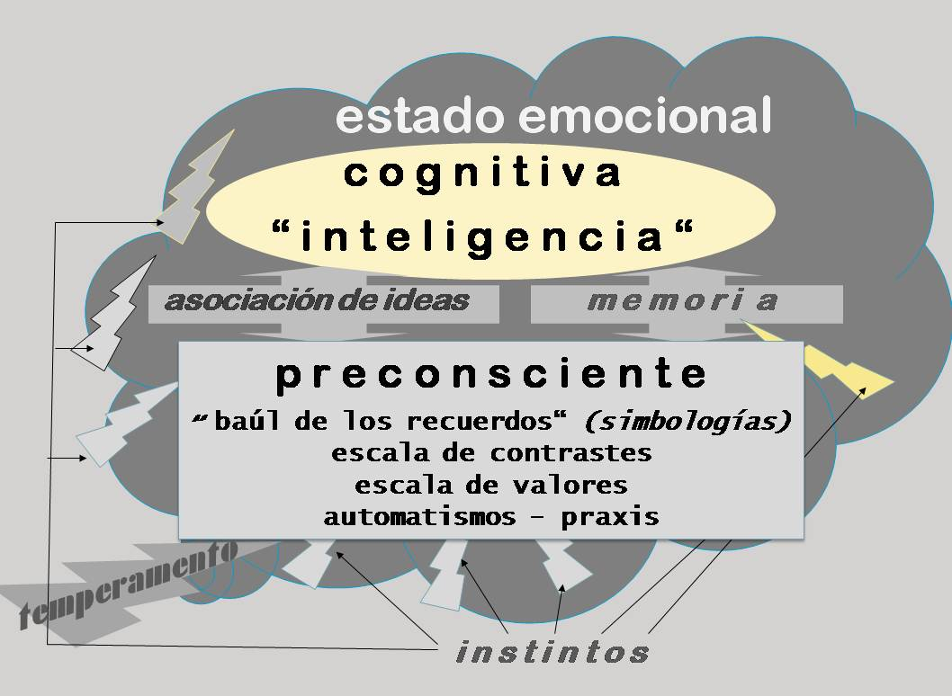 integración de las 4 esferas de la mente y sus interrelaciones